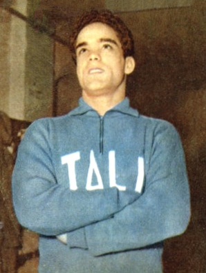 Ignazio Fabra